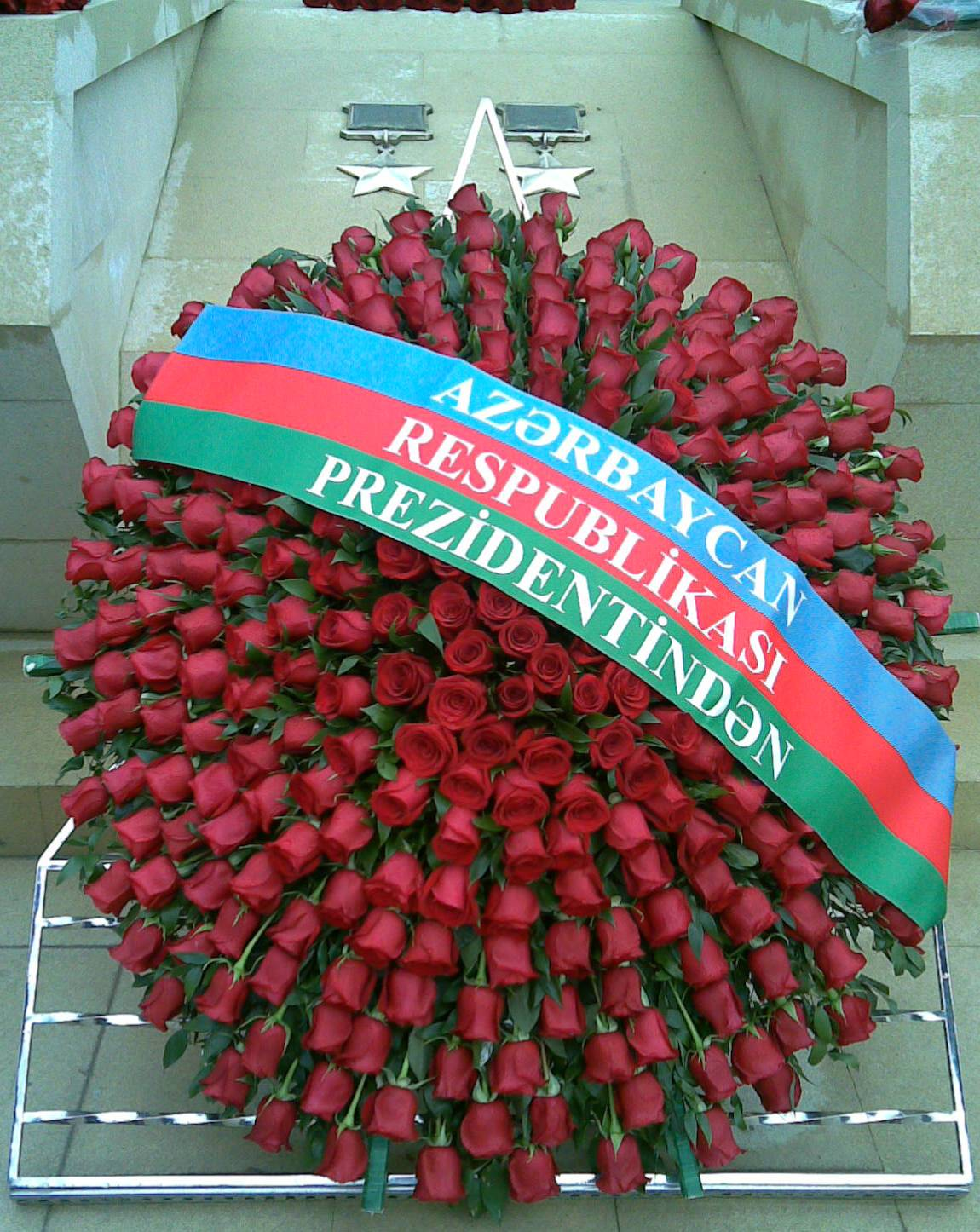 Azərbaycan Respublikası Prezidentindən xatirə. Həzi Aslanovun məzarı.